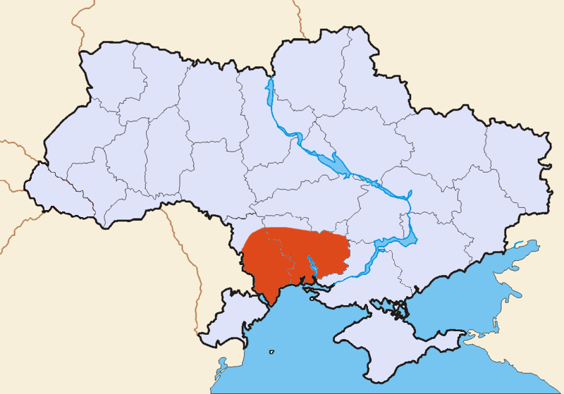 Position du Yedisan en Ukraine